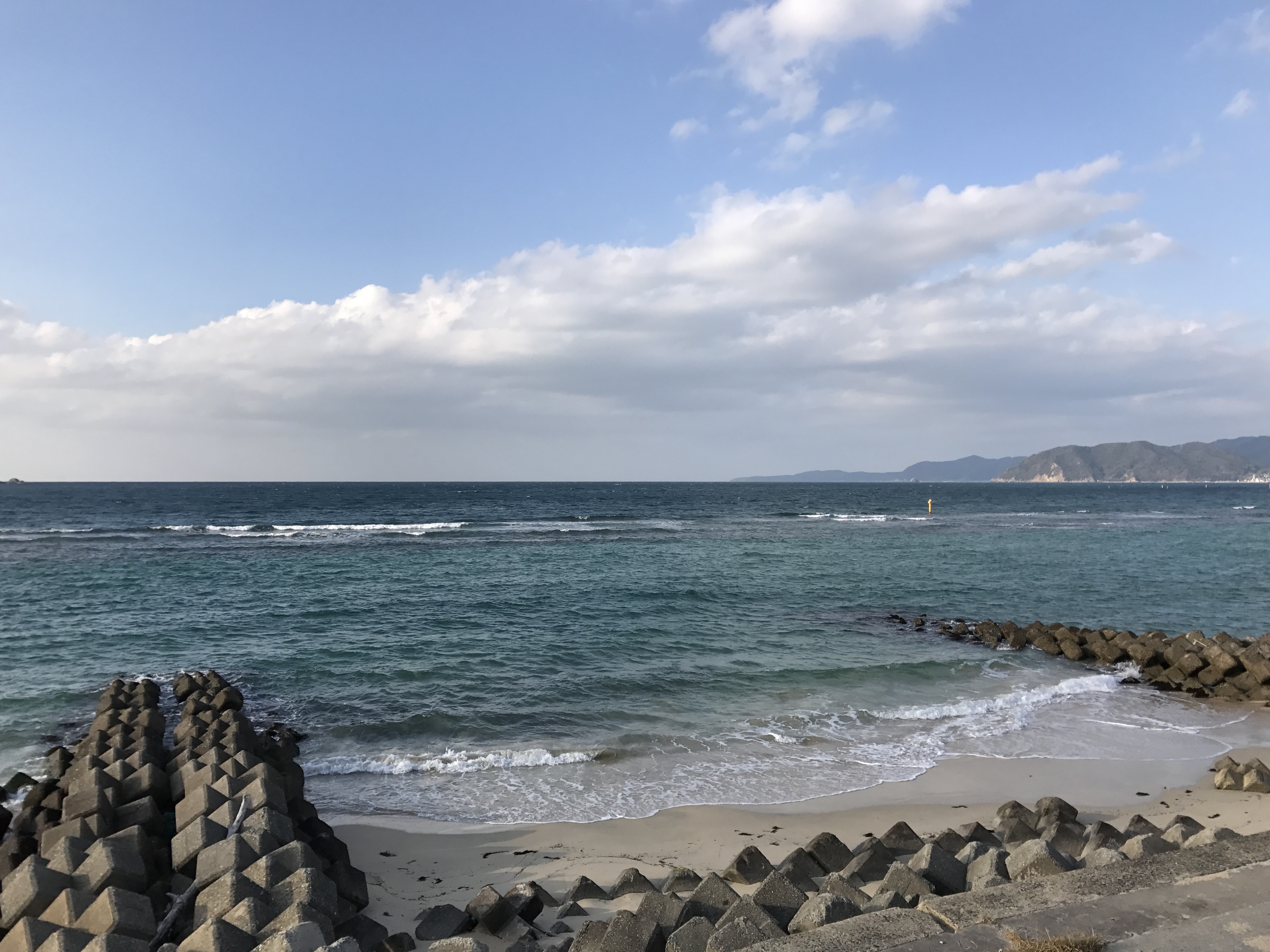 水尻川河口の響橋より望む響灘